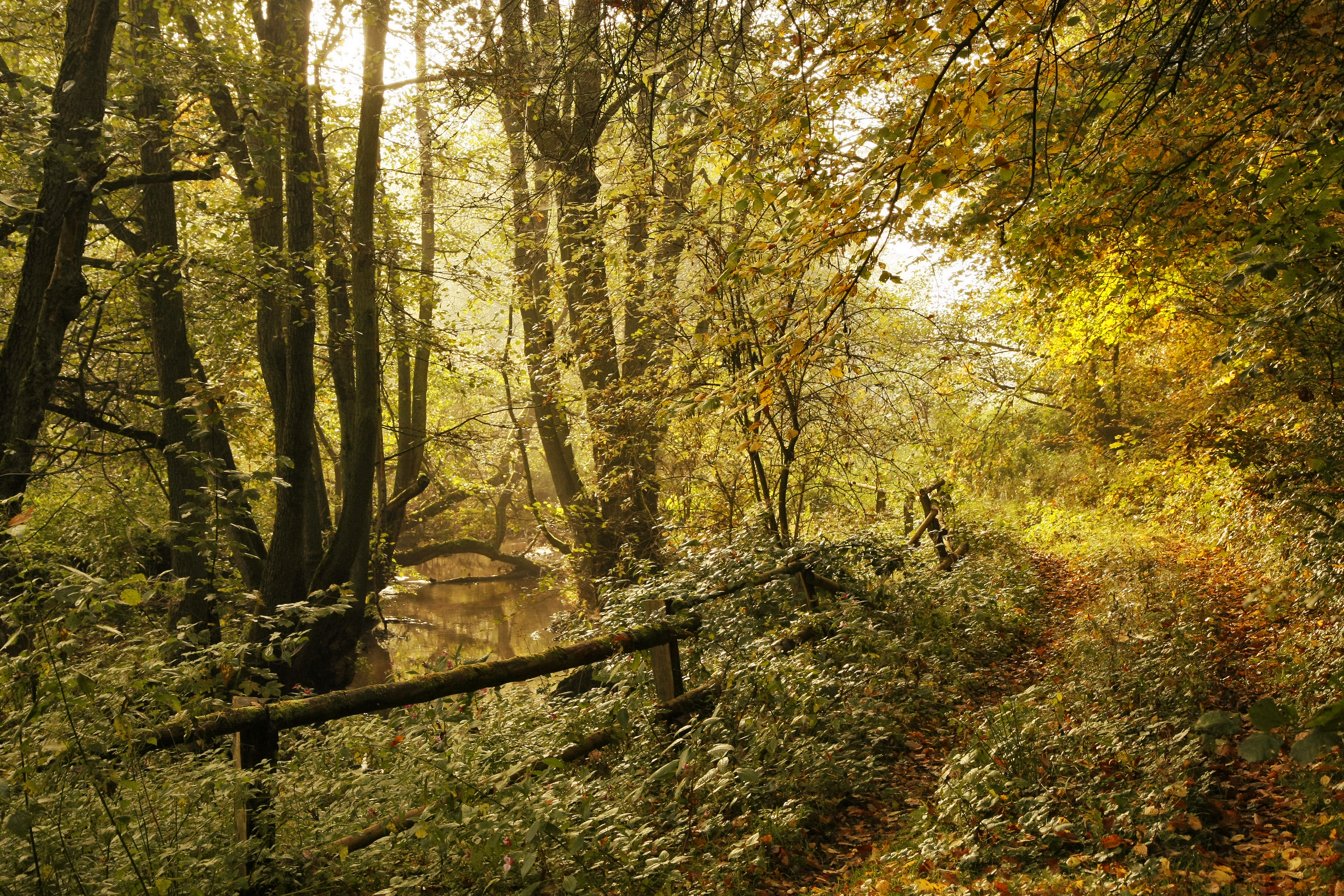 Die Ill im Landschaftsschutzgebiet L 4.01.07 "Dirmingen – alte Ziegelei" und Naturschutzgebiet NSG-104 "Täler der Ill und ihrer Nebenbäche".